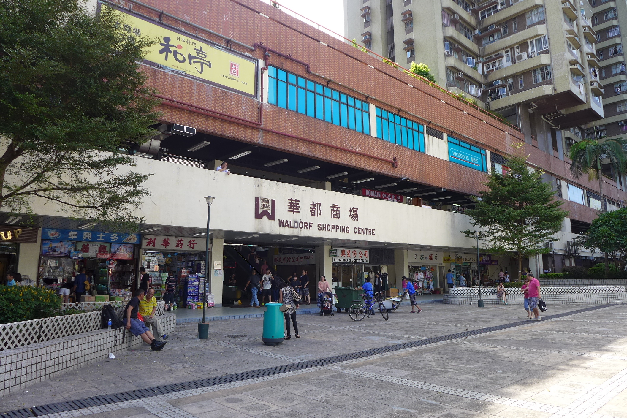 Waldorf Garden Shopping Arcade